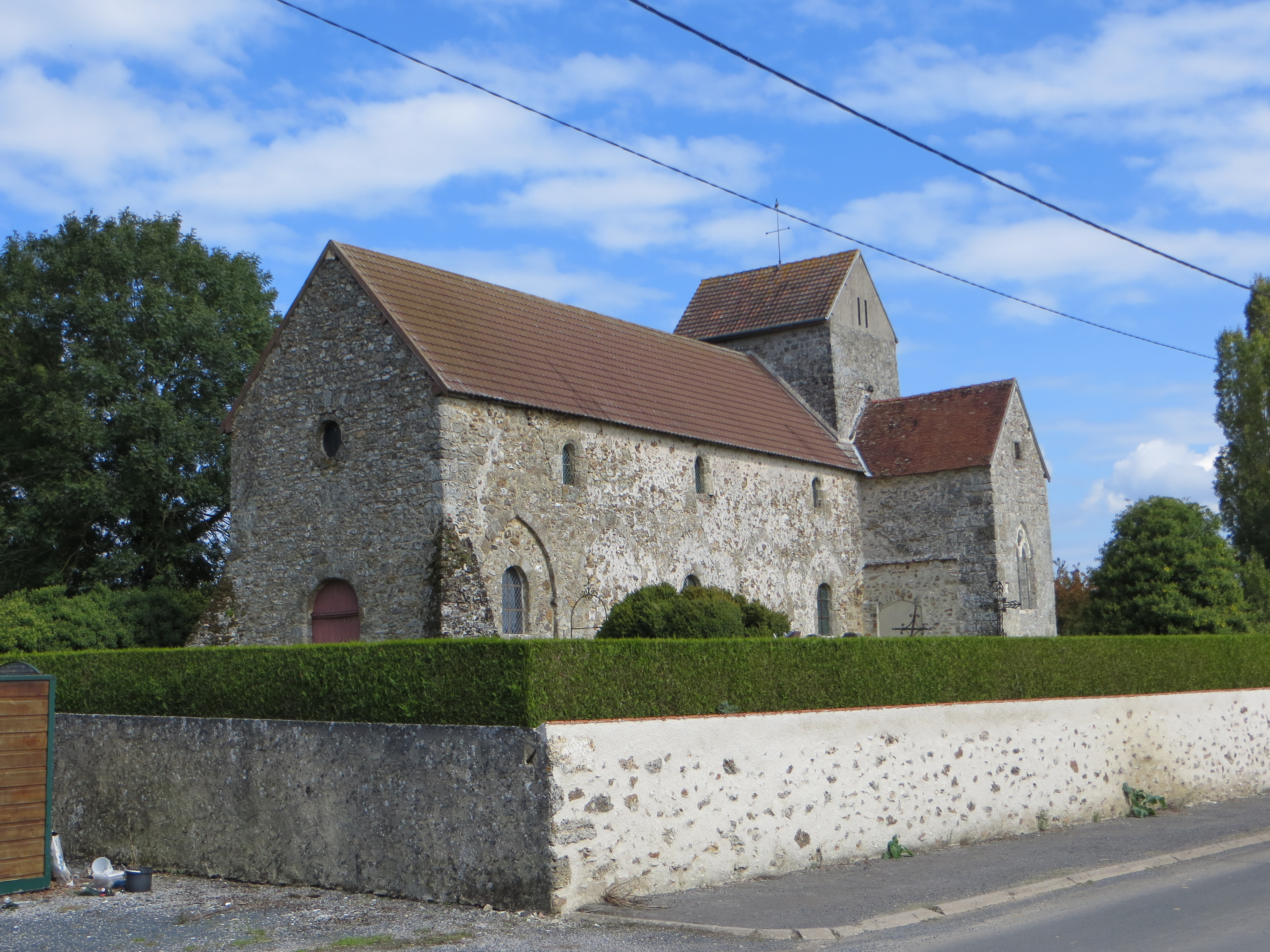 Vue générale de l'église